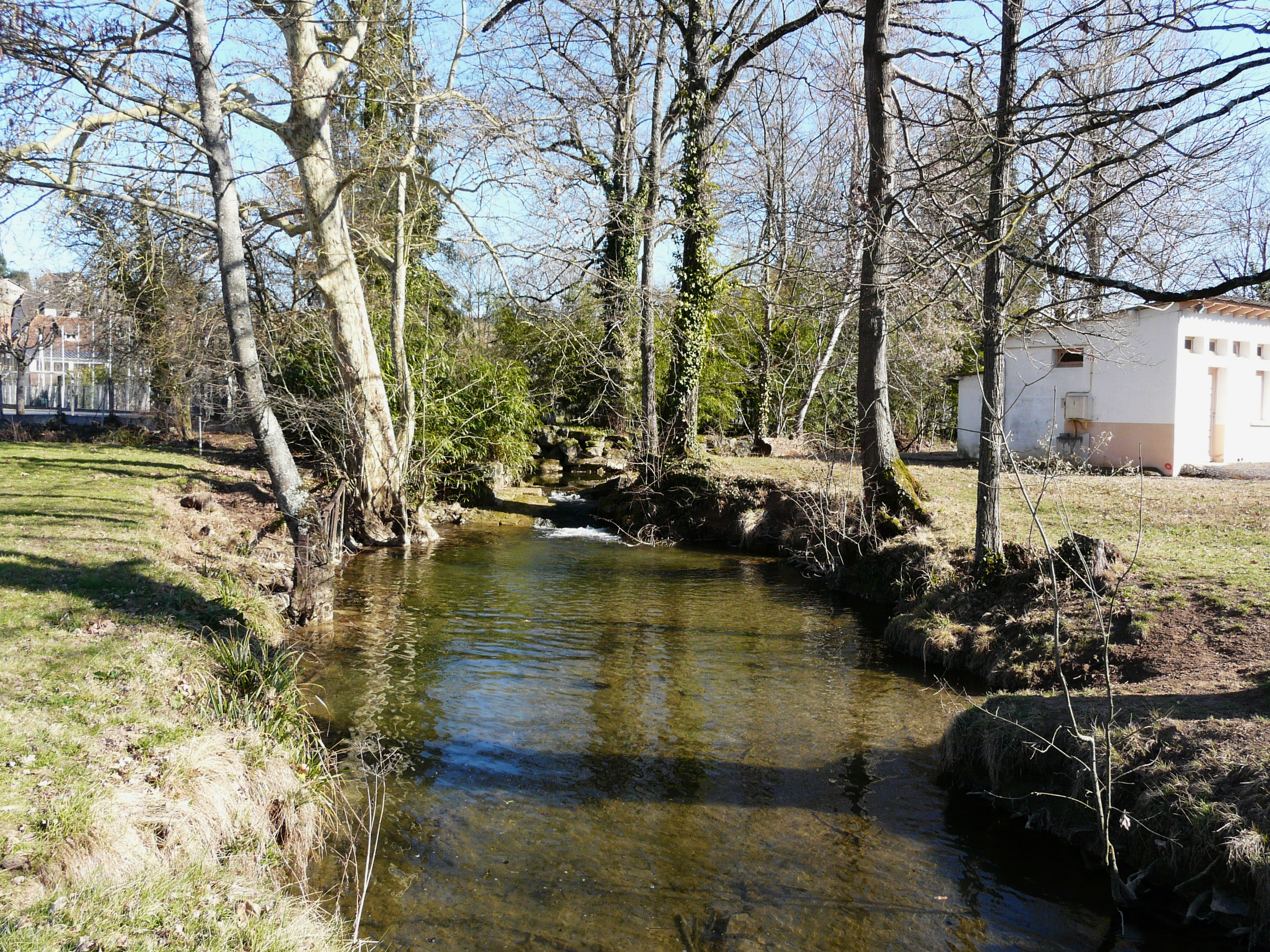 La Couze près du terrain de sports, entre Larche, Corrèze (à gauche) et La Feuillade, Dordogne, France. Vue prise en direction de l'amont.